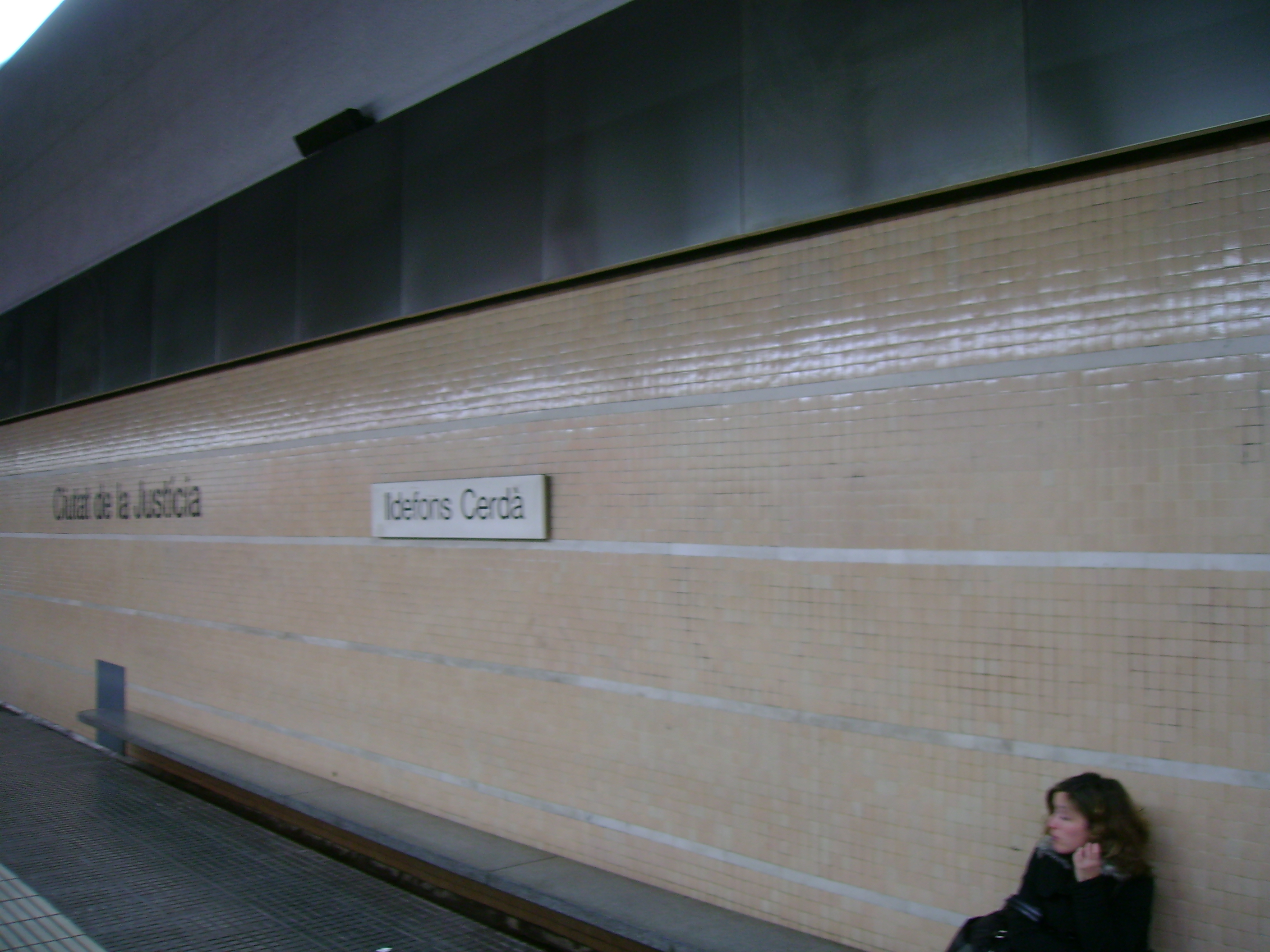 Foto capturada per la meva càmara a l'estació d'Ildefons Cerdà (Metro de Barcelona).